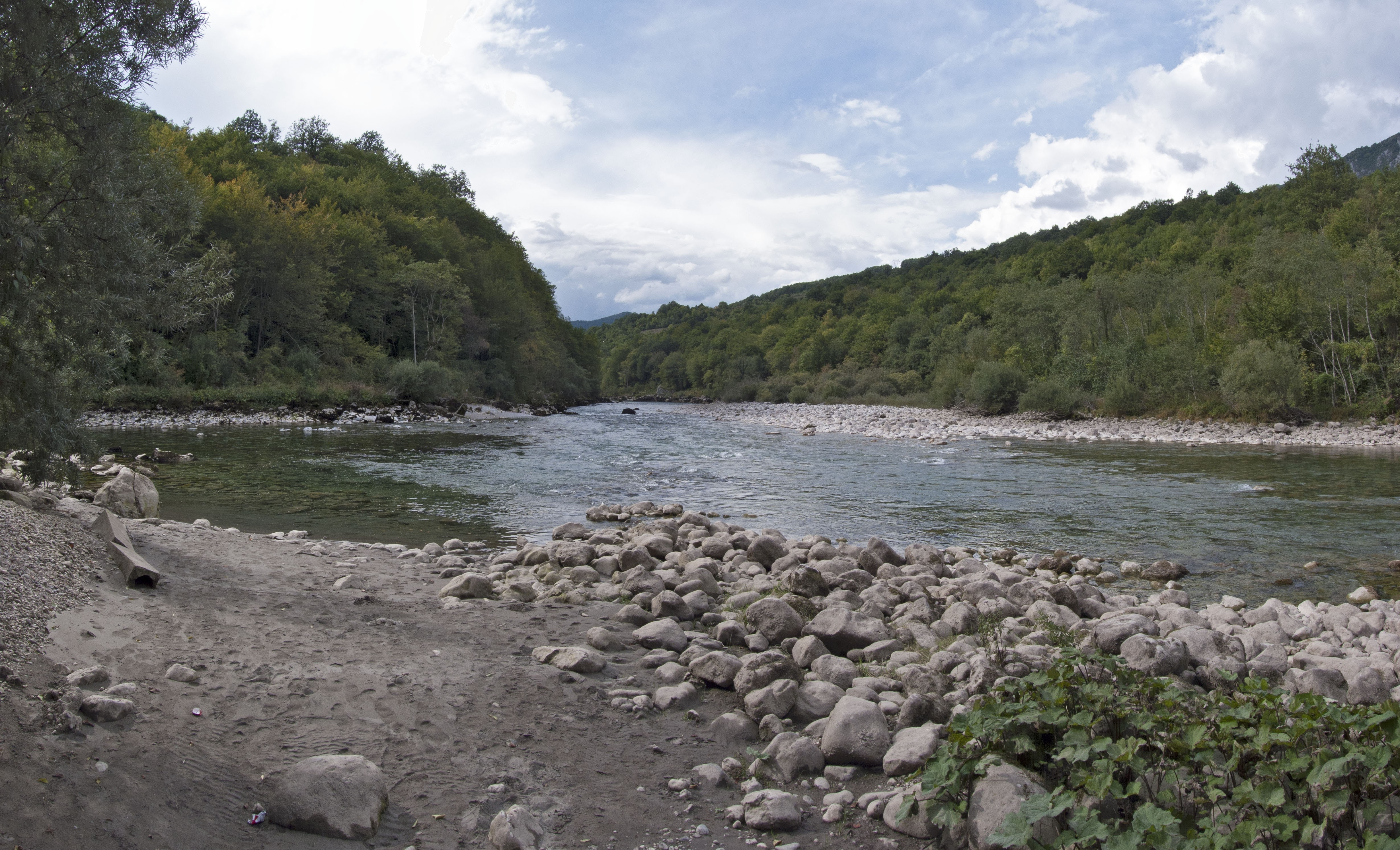 Впадение Тары в Дрину